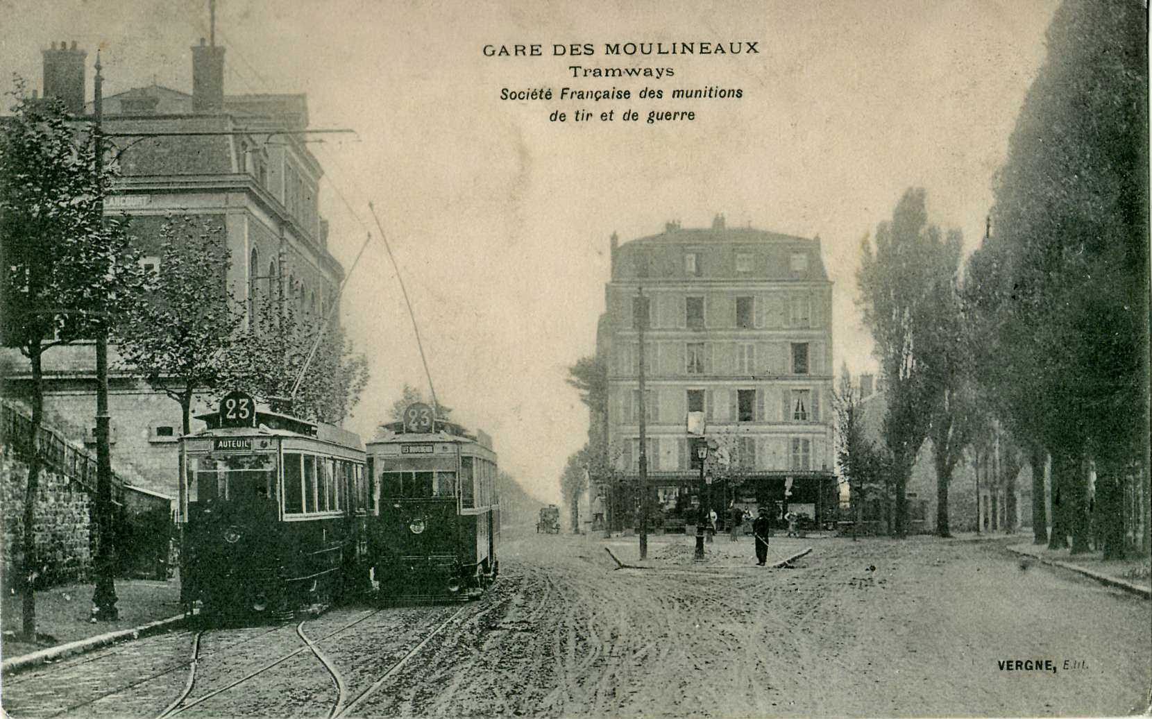 Carte postale ancienne éditée par VergneGare des Moulineaux - Tramways - Société française des munitions de tir et de guerre En 1935, la ligne 23 de la STCRP reliait Auteuil - Boulogne - Les Moulineaux - Porte de Versailles